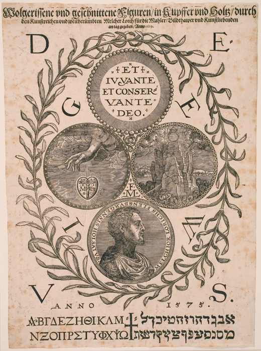 Melchior Lorck (1527-1626), Titelblad til "Wolgerissene und geschnittene Figuren in Kupffer und Holz durch.Den Kunstreichen und weitberümten Melcher Lorch für die Mahler Bildthawer und Kunstliebenden.an tag gegeben Anno 1619", 1619